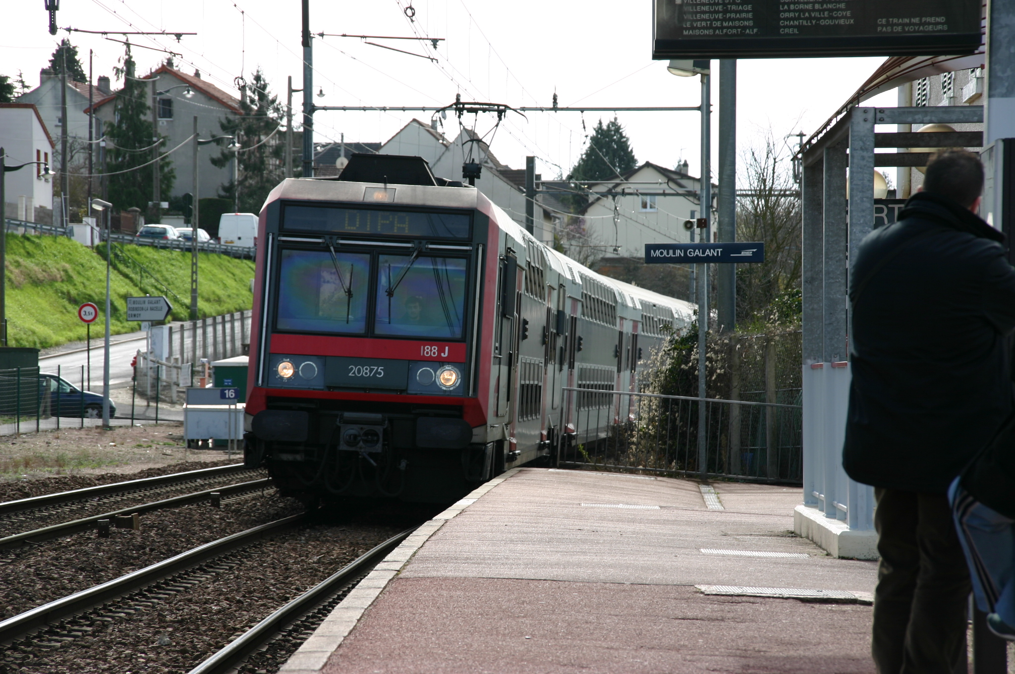 La gare de Moulin-Galant, Corbeil-Essonnes, département de l'Essonne (France)